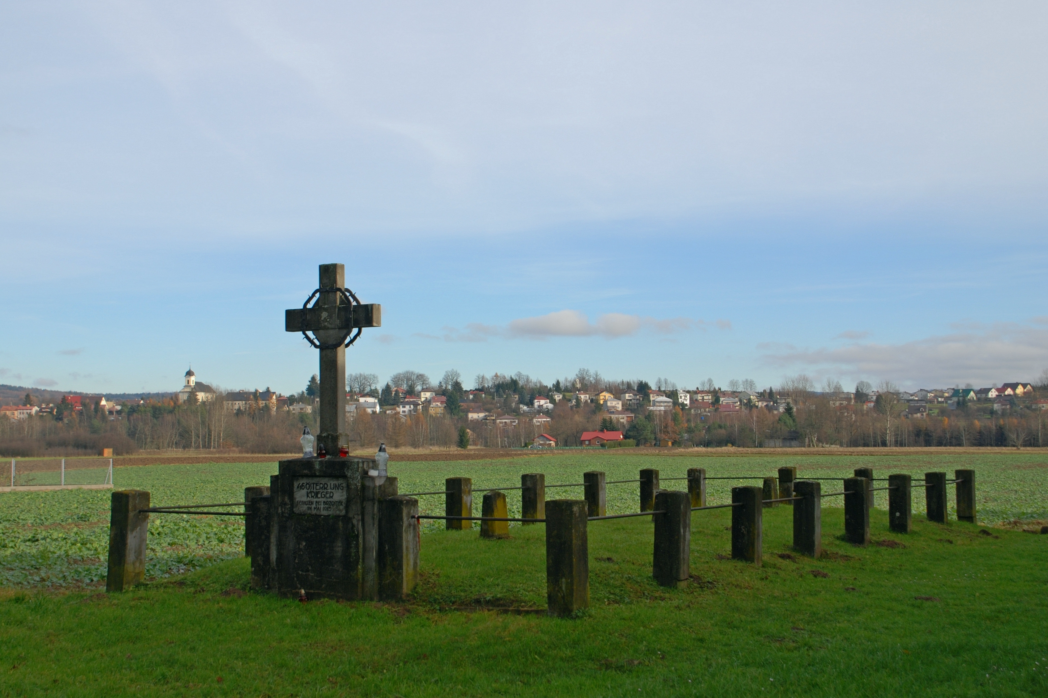 miasto Brzostek